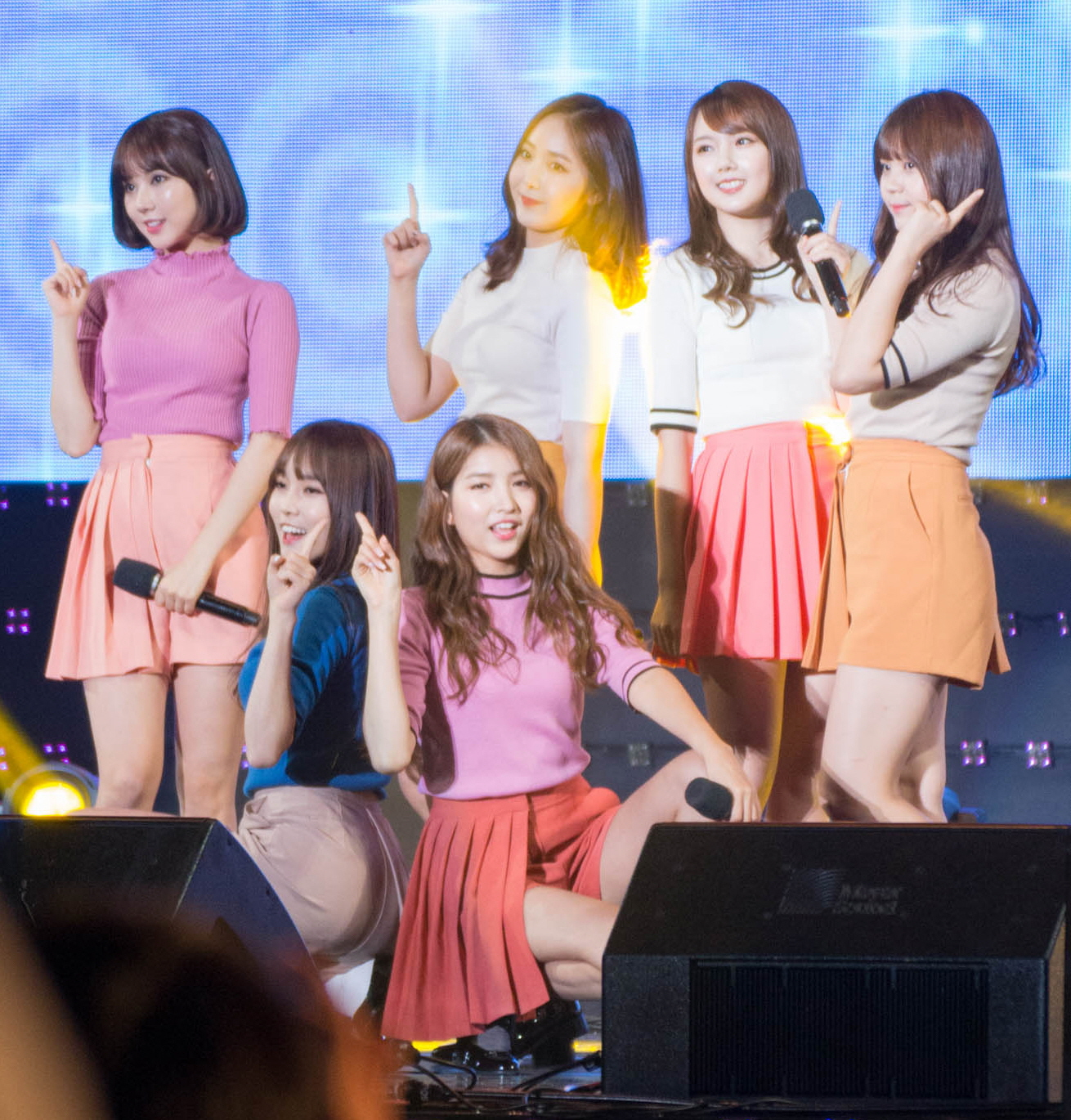 (2016.08.31)원주 한마음 콘서트 여자친구 직찍 by곰탱유